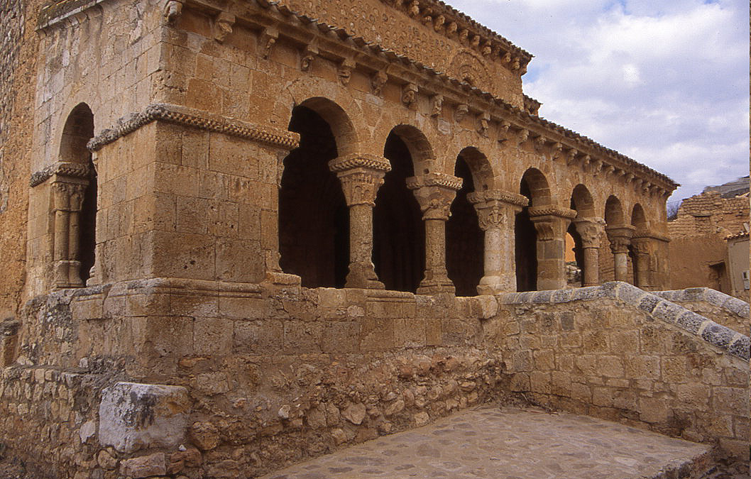 Vista del pórtico de la iglesia románica de San Miguel, en San Esteban de Gormaz (Soria, España). Original en diapositiva de 35 mm. tomada en abril de 2002.